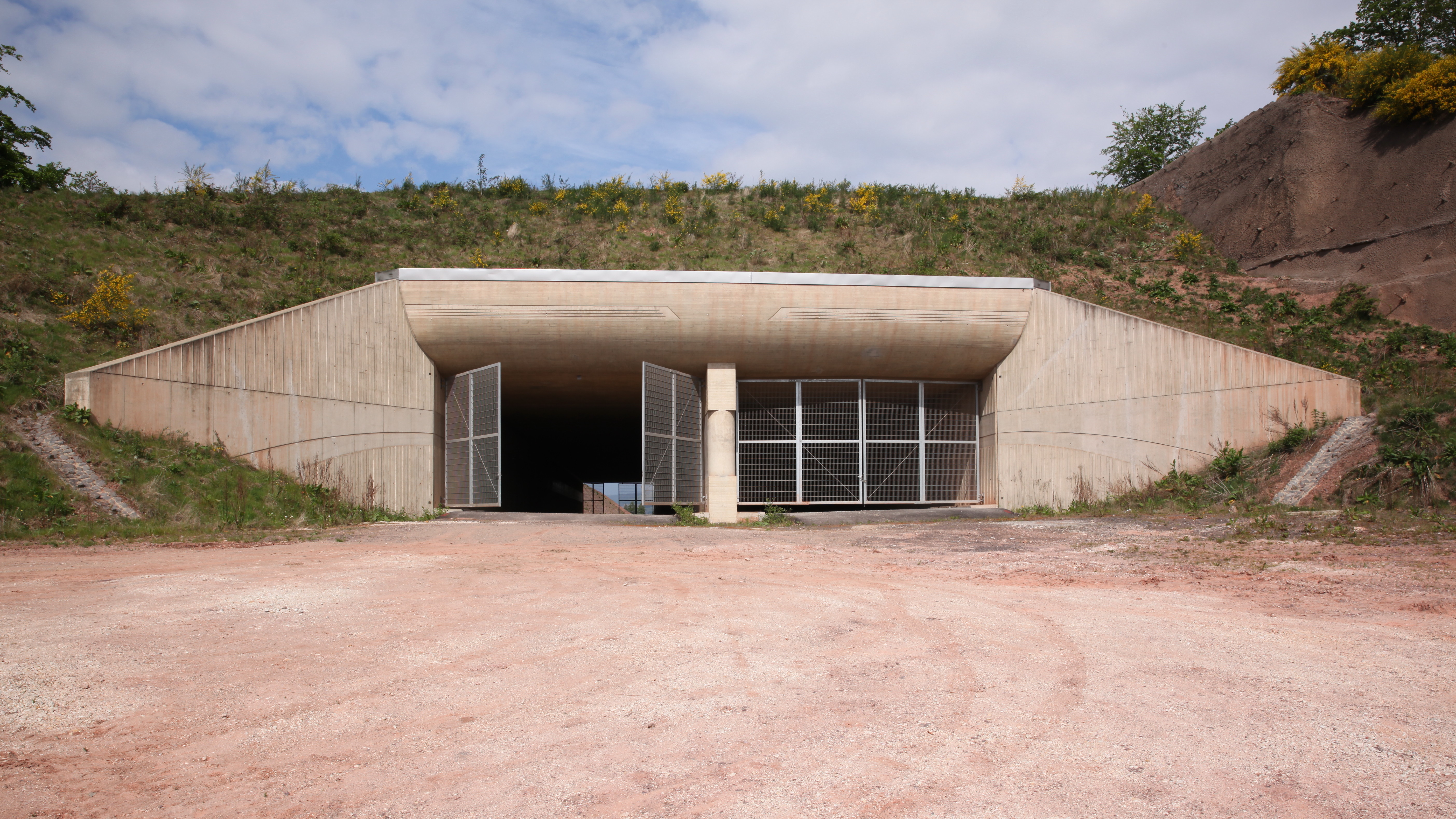 Hochmoselübergang, Tunnel am Rothenberg